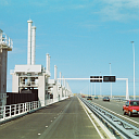 voorbeeld gif dithering, eigen foto, eigen werk.